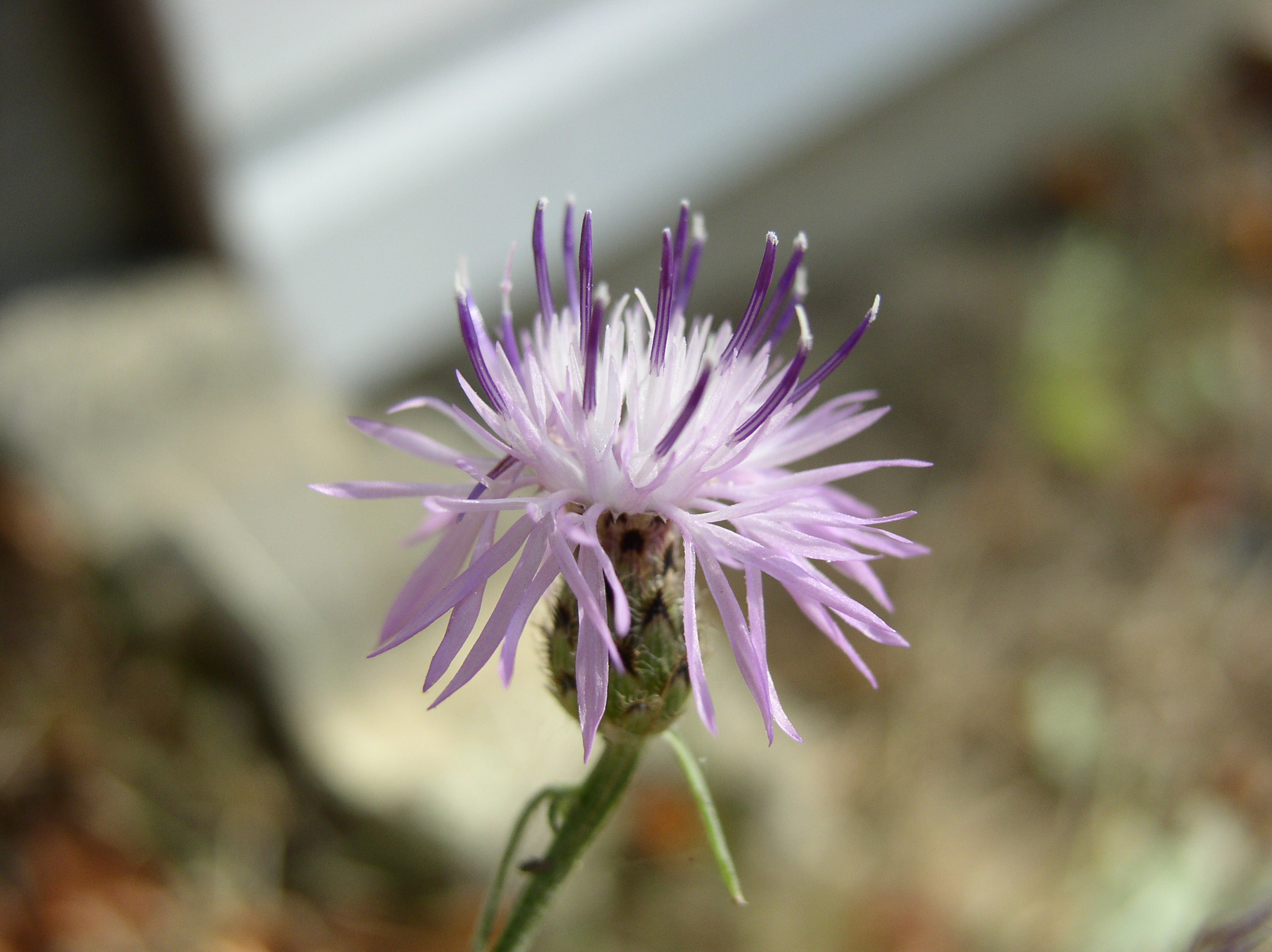 Centaurea stoebe